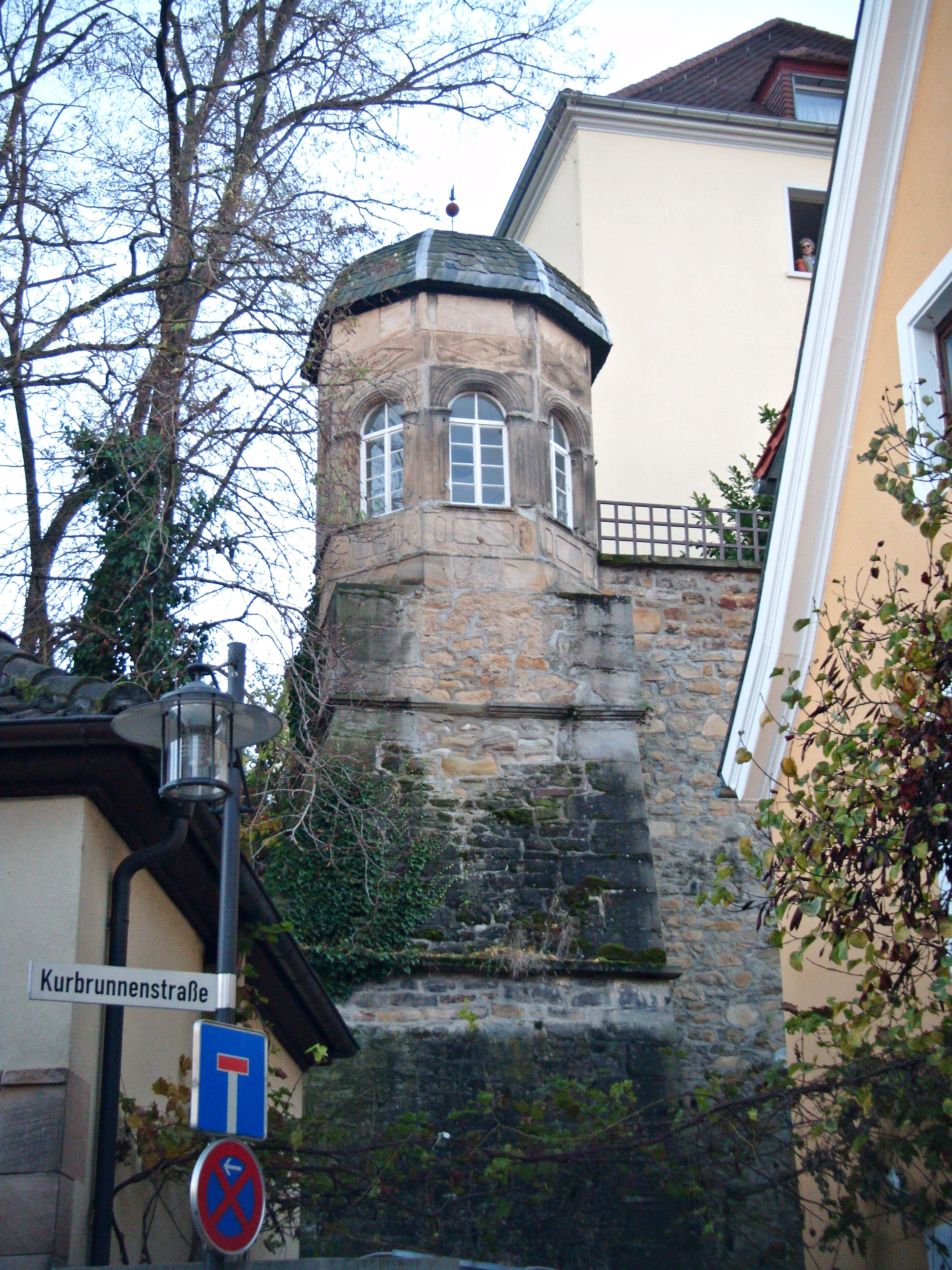 Bad Dürkheim, Pavillon des leininger Schlosses